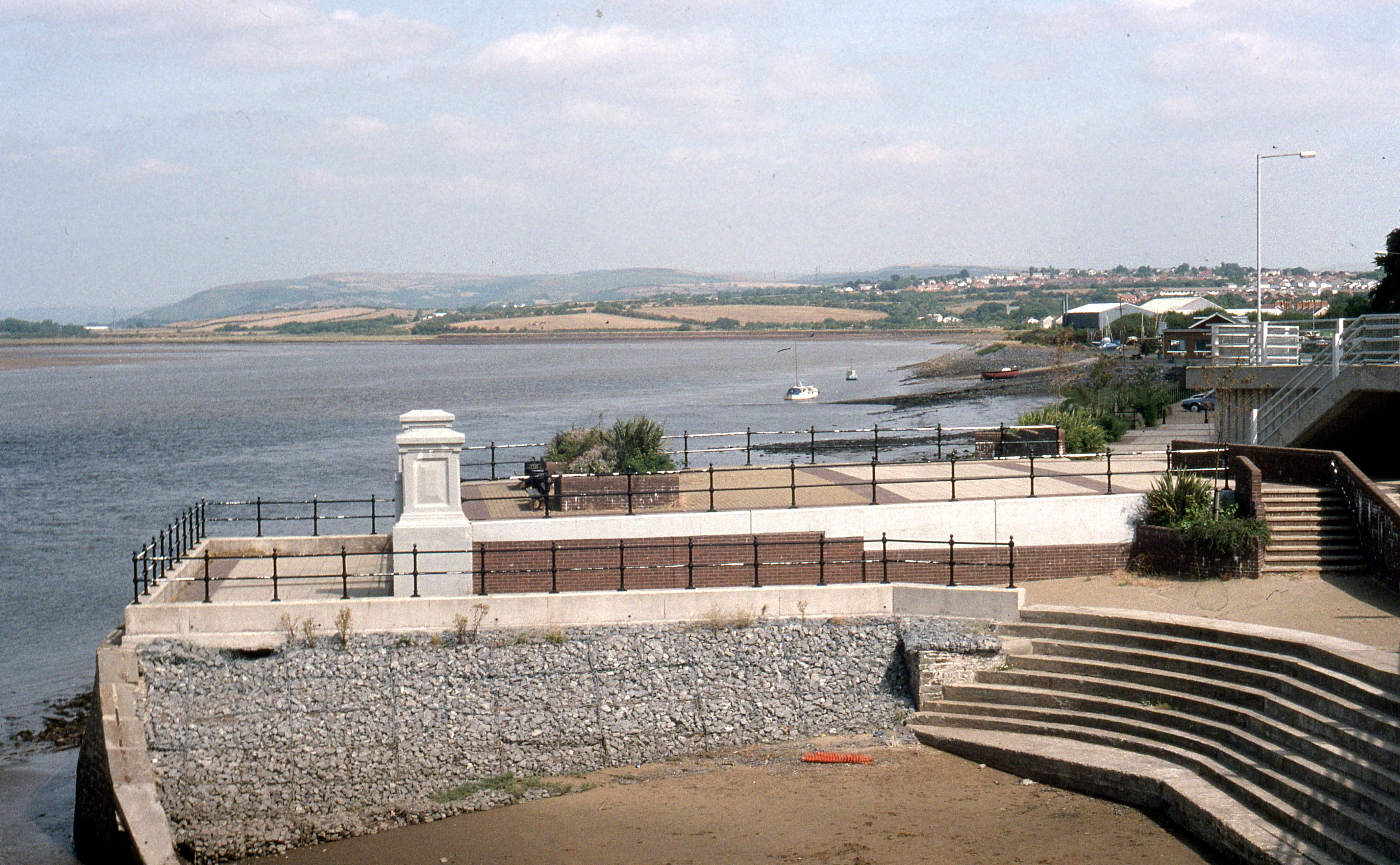 August 1995